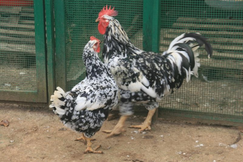 gallo y gallina de asturias